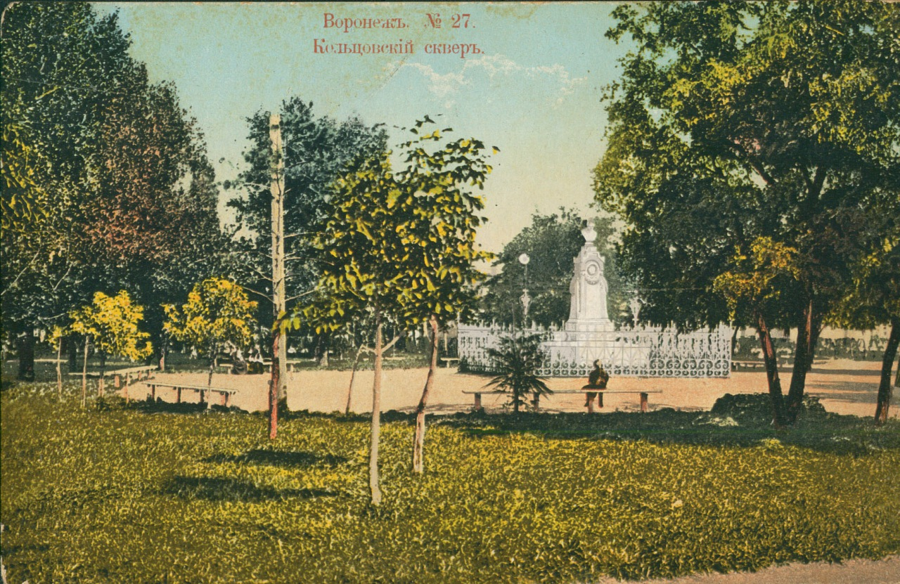 Кольцовский сквер (цветное)